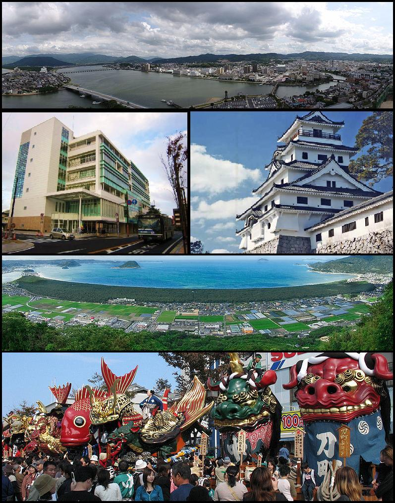 唐津市のモンタージュ。